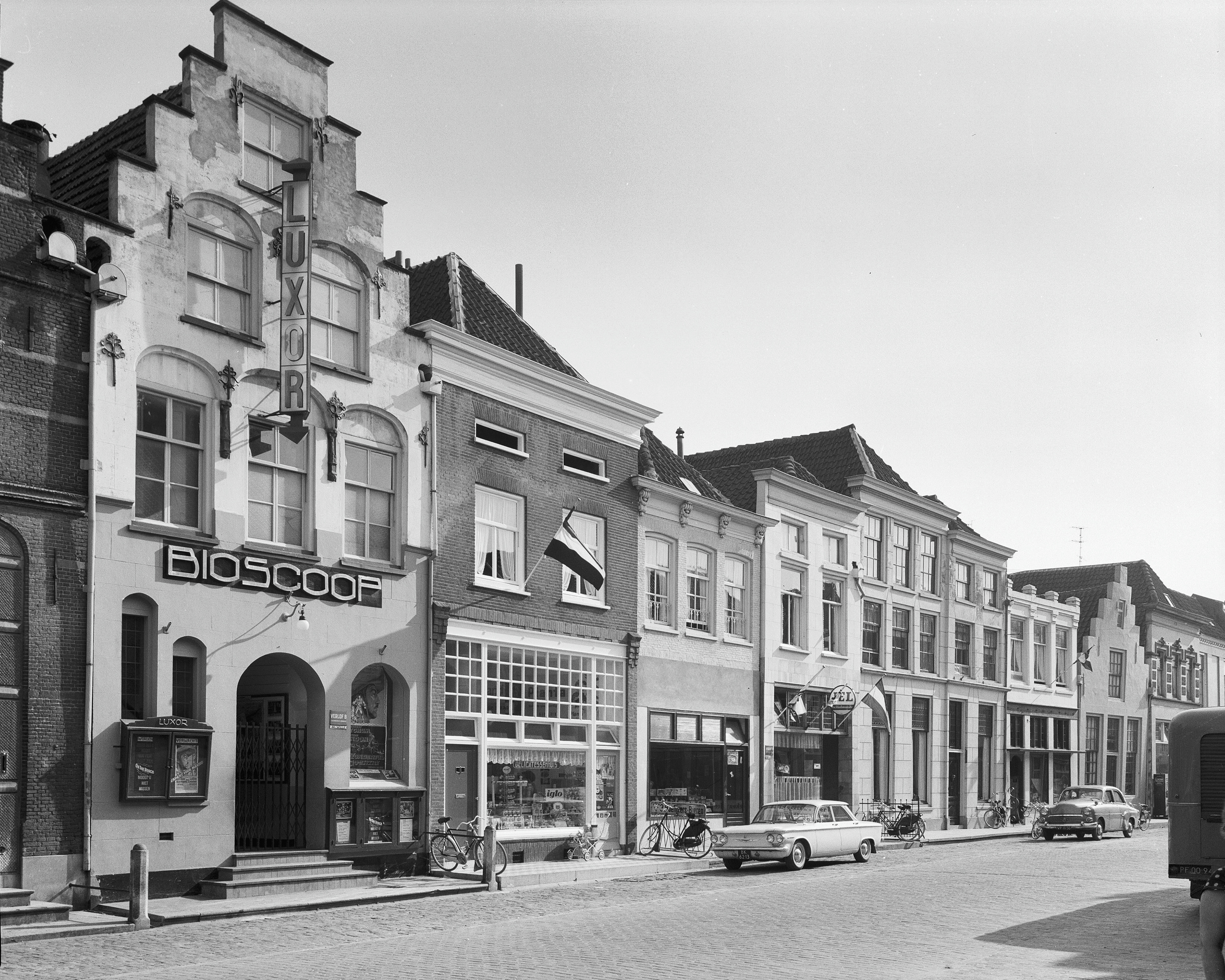 zuidwand 22 t/m 6, overzicht